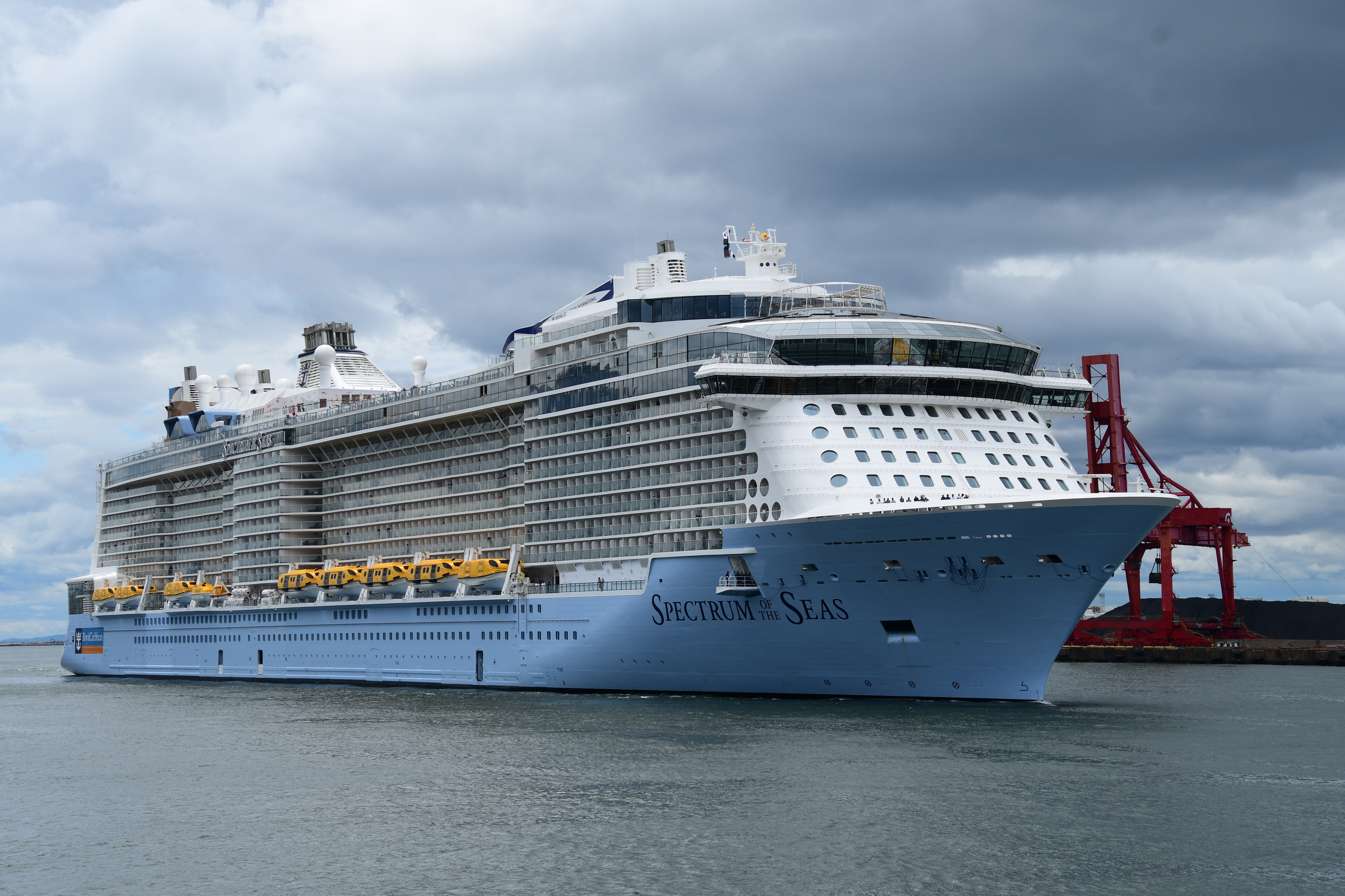 大阪天保山に入港するスペクトラム・オブ・ザ・シーズ Nikon D7500